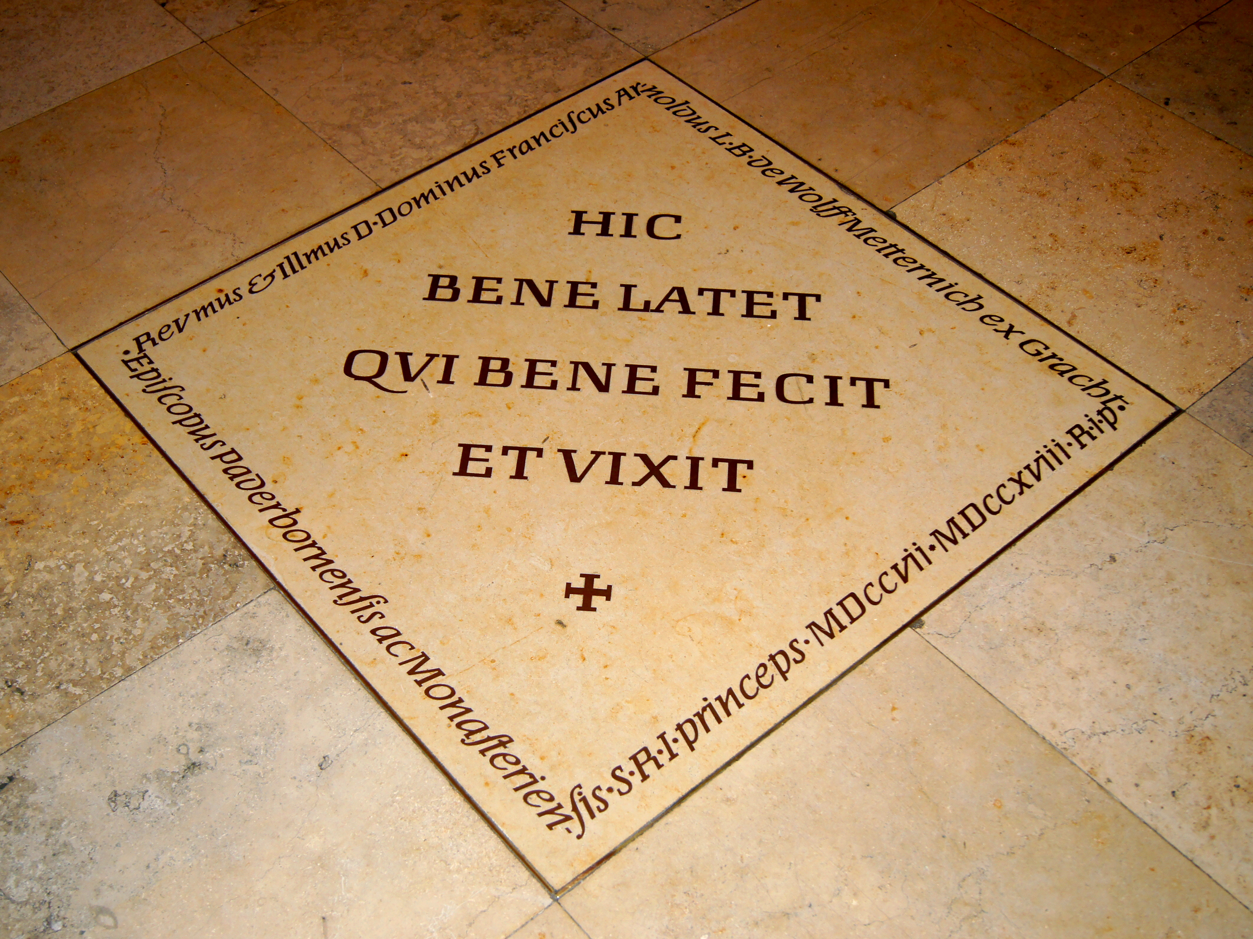 Bodenplatte in der Jesuitenkirche Coesfeld zur an den Fürstbischof Franz Arnold von Wolff-Metternich zur Gracht (* 9. Mai 1658 auf Schloss Gracht in Liblar, heute zu Erftstadt; † 25. Dezember 1718 in Schloss Ahaus), der in der Kirche begraben wurde.